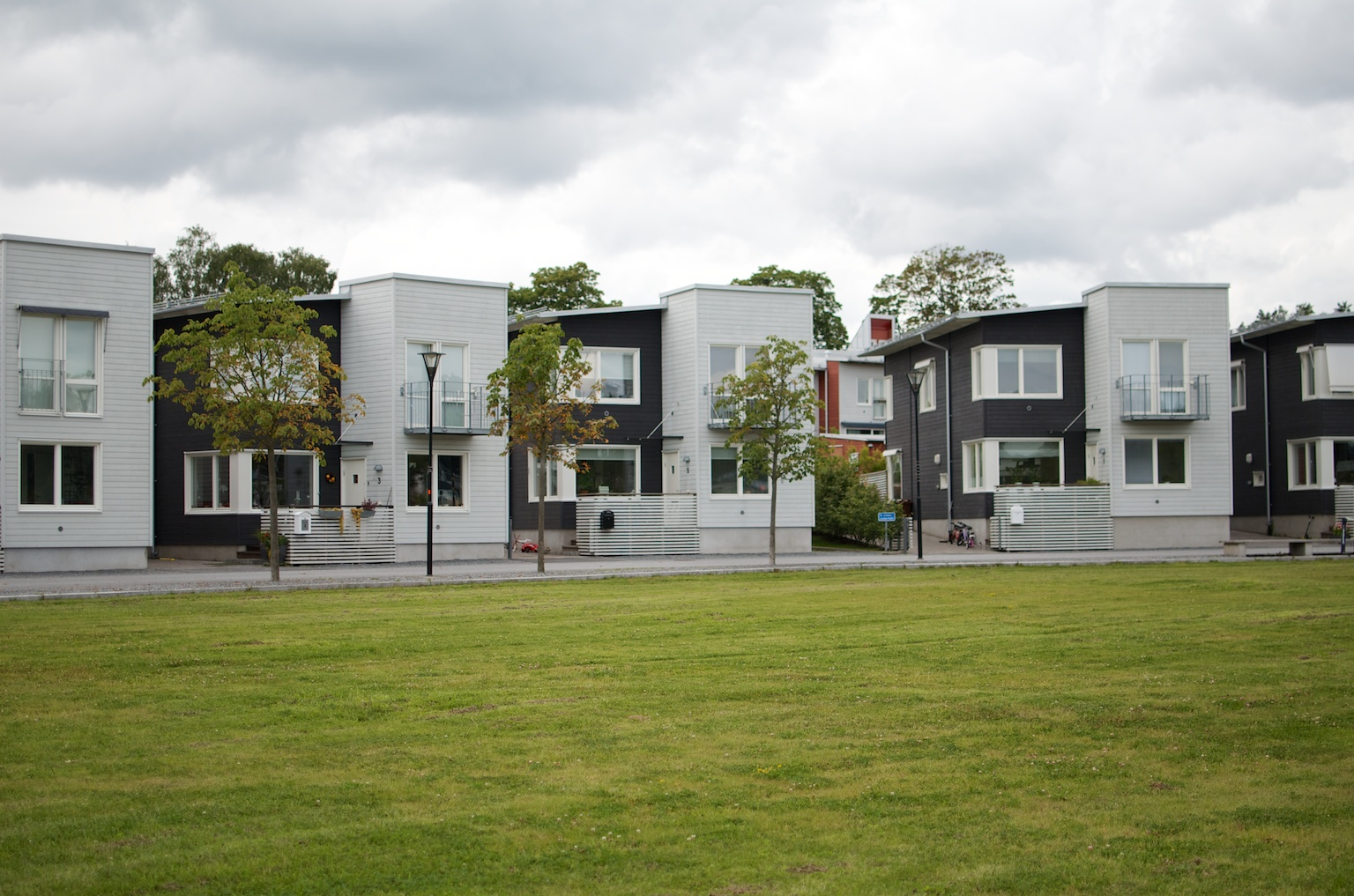 Silverdal